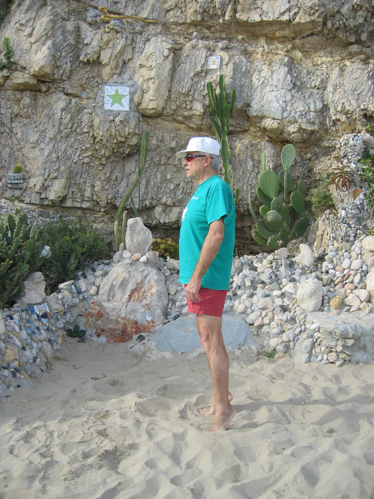 8è moviment de txi kung - Baduanjin foto meva novembre 2006 Joan Inglada Lliure ús